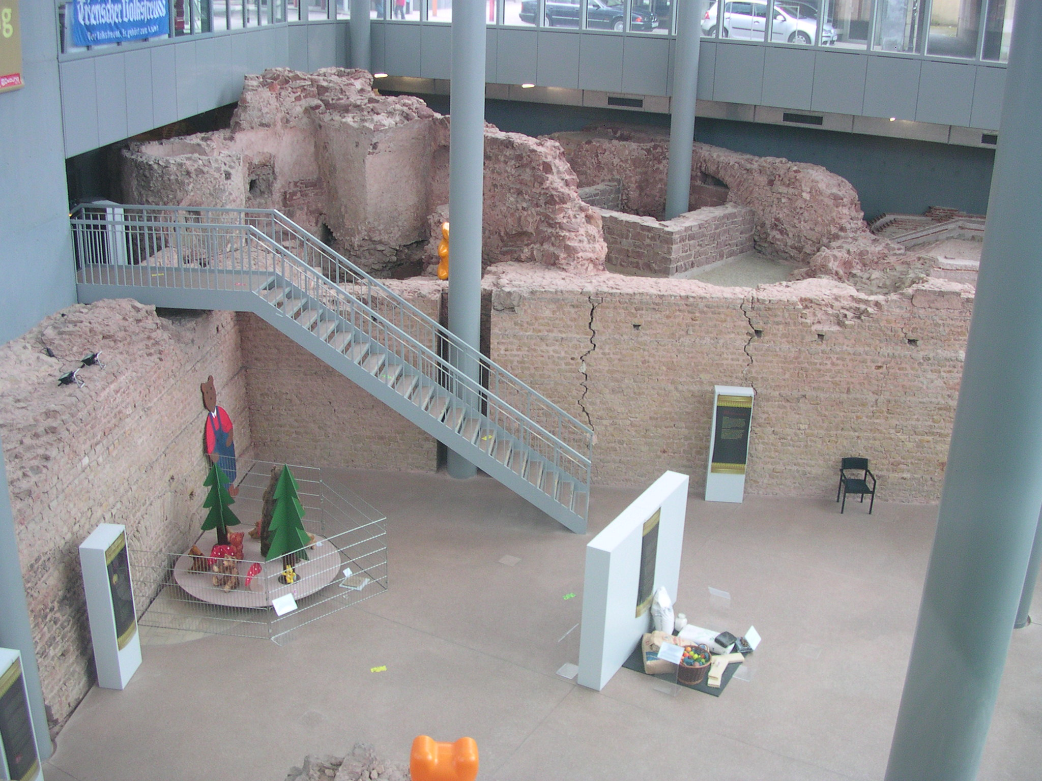 Viehmarktthermen in Trier mit einer Ausstellung über Gummibärchen: Vorne der größte Raum der römischen Thermen, im Hintergrund sind diagonal dazu die Ruinen der Gebäude zu sehen, die vom Kapuzinerorden über einem Teil der Thermenanlage erbaut wurden.